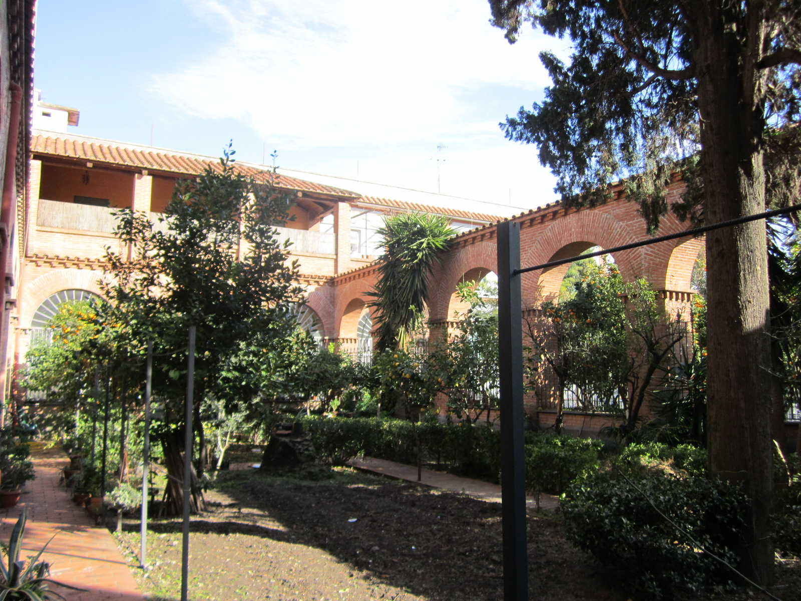 giardino